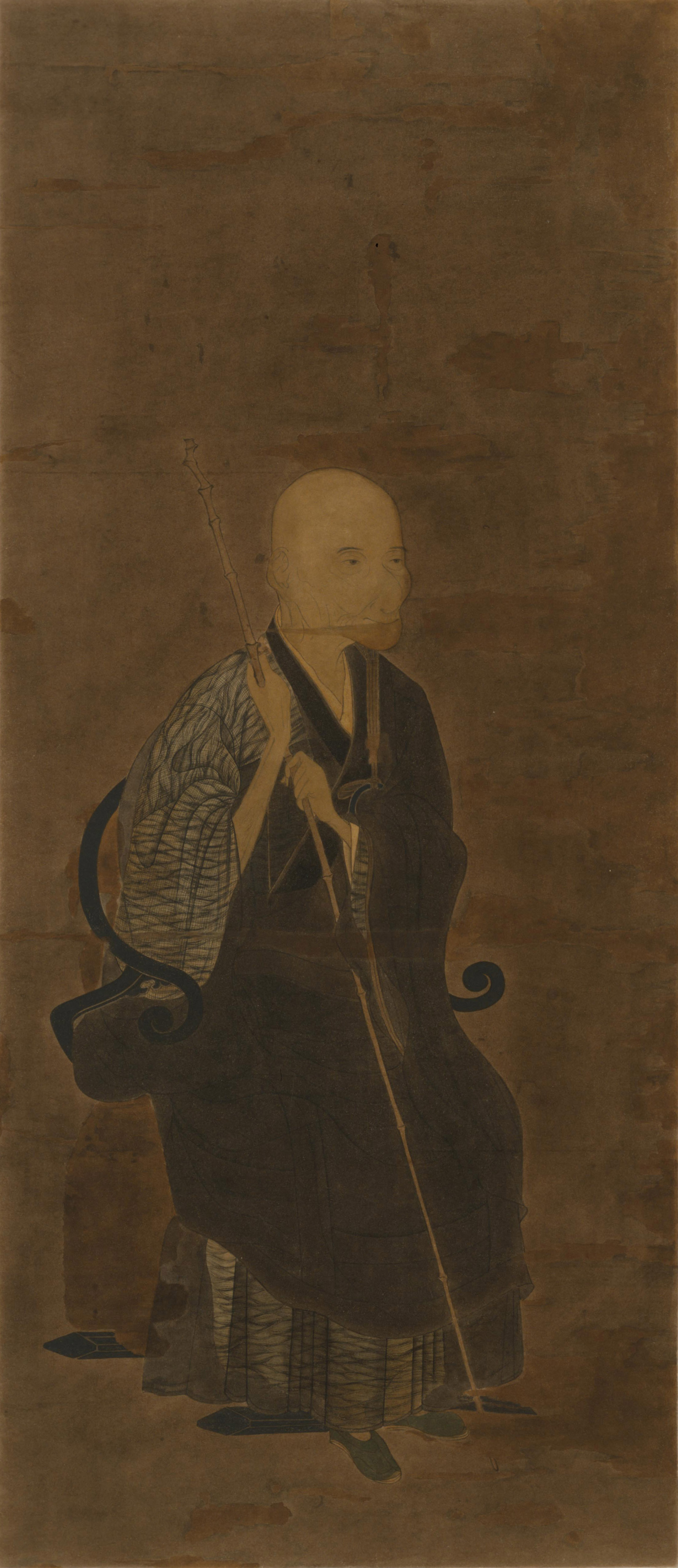 細川成之の肖像。徳島県丈六寺。